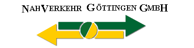 NVG Göttingen Symbol